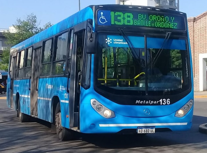 Mercedes-Benz O-500 de la línea 138, cuya empresa explotadora es El Cacique Ros